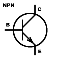 Schematisk Symbol för en NPN transistor B = Bas C = Kollektor (eng. Collector) E = Emitter Gjord av: Daniel Ryde, Skövde 2004-08-27 Licens: GFDL